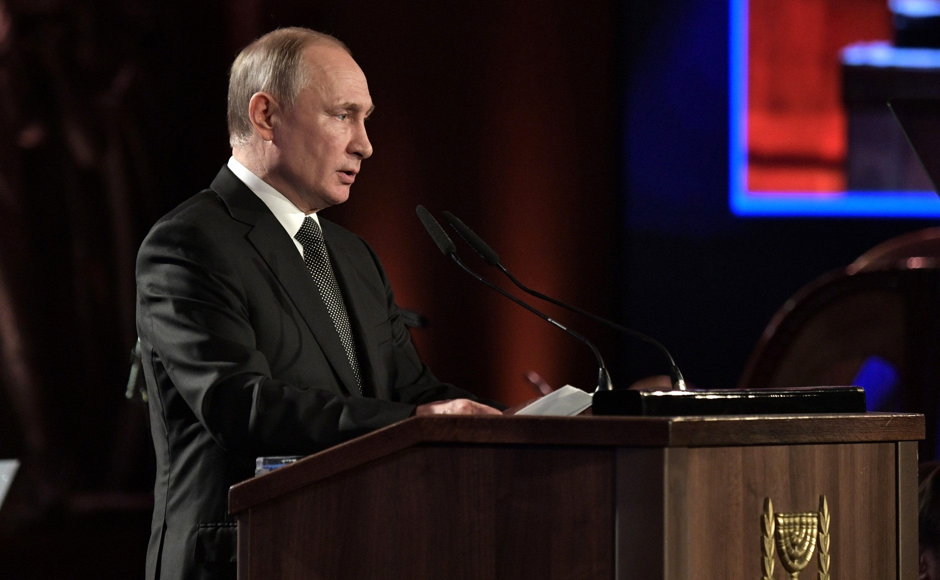 На форуме «Сохраняем память о Холокосте, боремся с антисемитизмом».